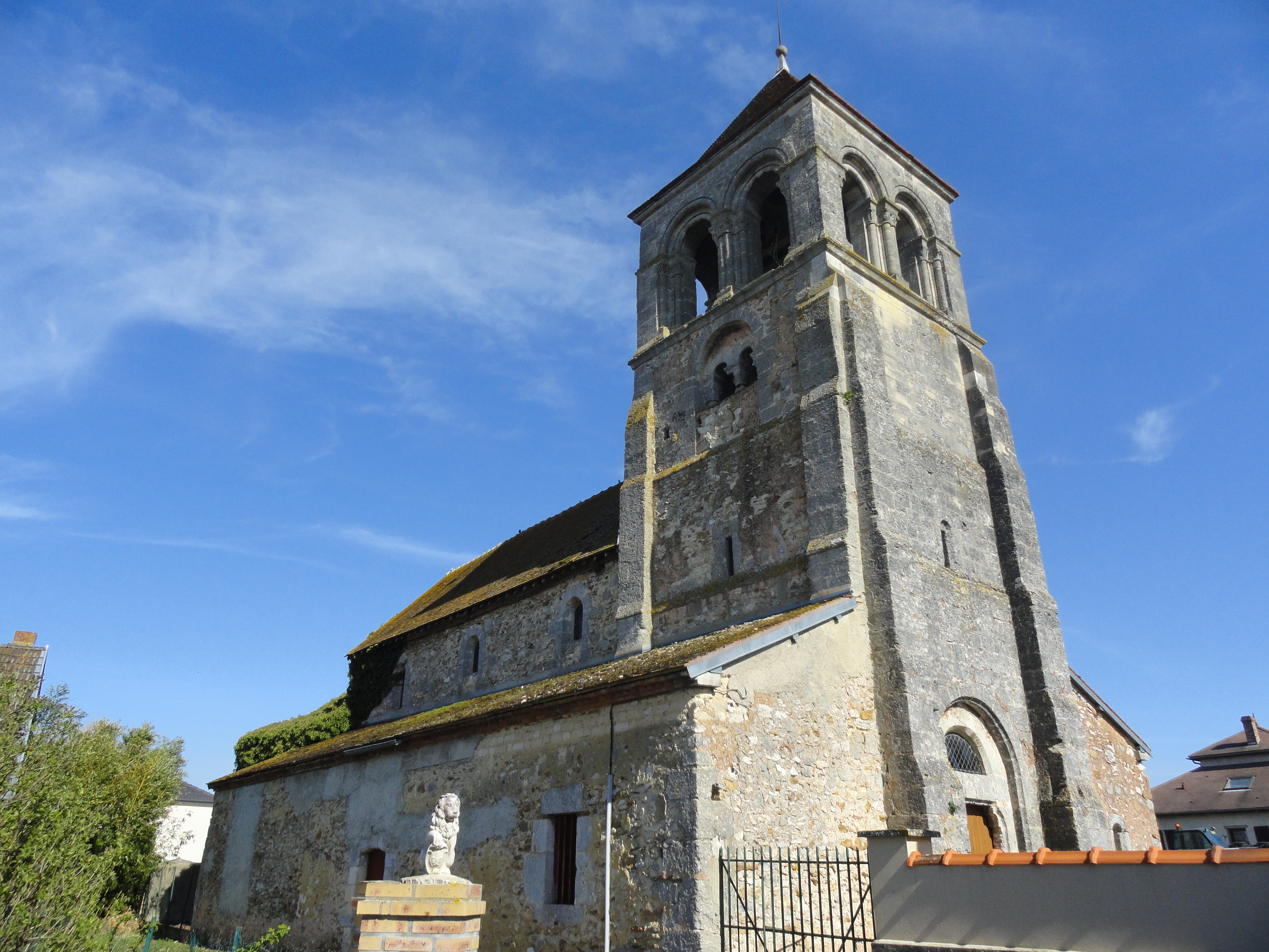 Côté nord de l'église Saint-Thibault de Flavigny (51).